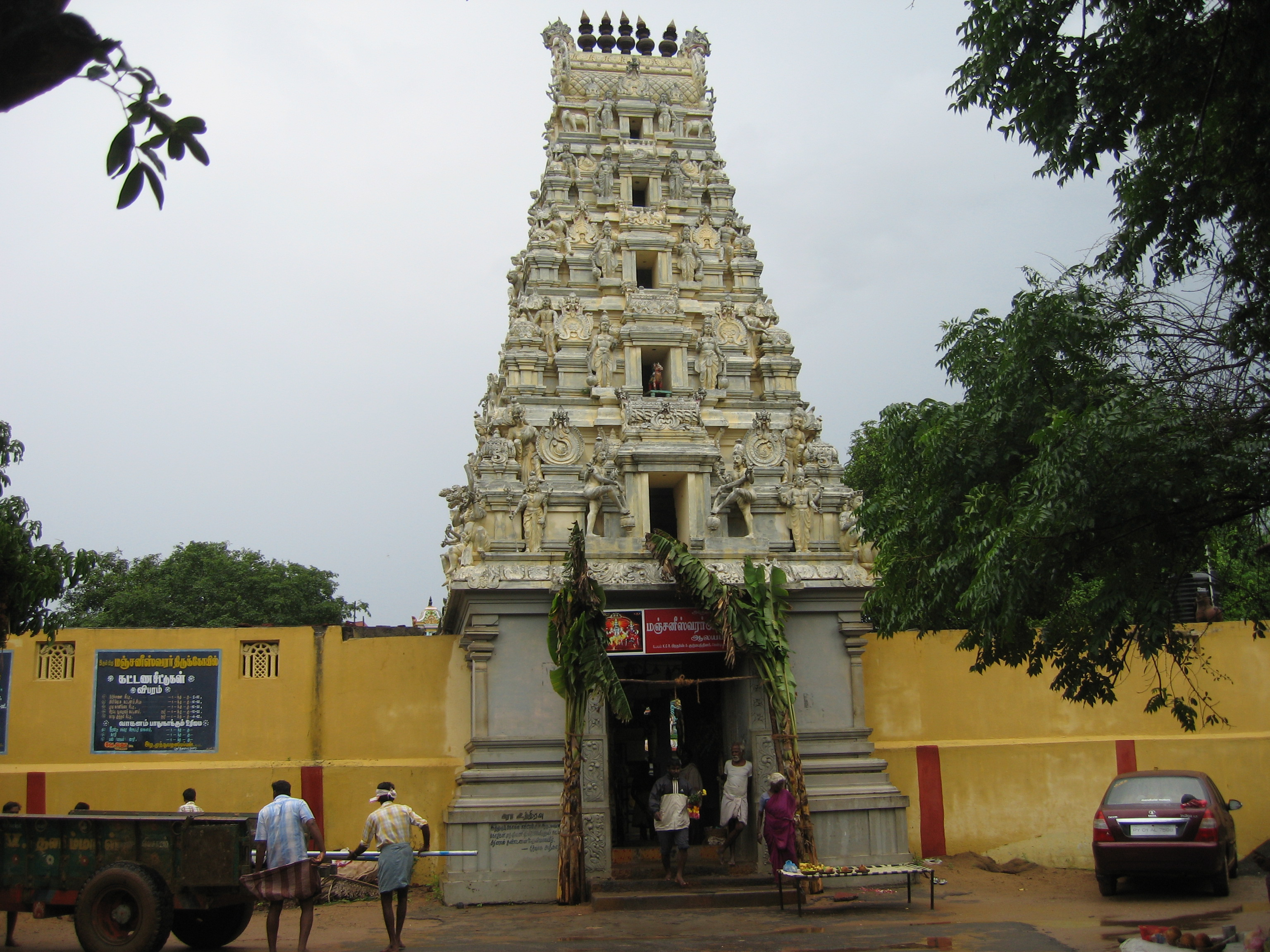 புதுவை கீழ்ப்புத்துப்பட்டு ஸ்ரீமஞ்சனீஸ்வர அய்யனார் கோயில் கோபுரத்தின் அழகிய தோற்றம்.